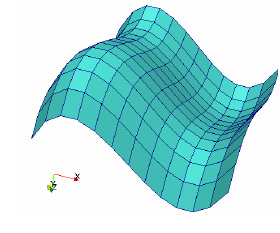 surface